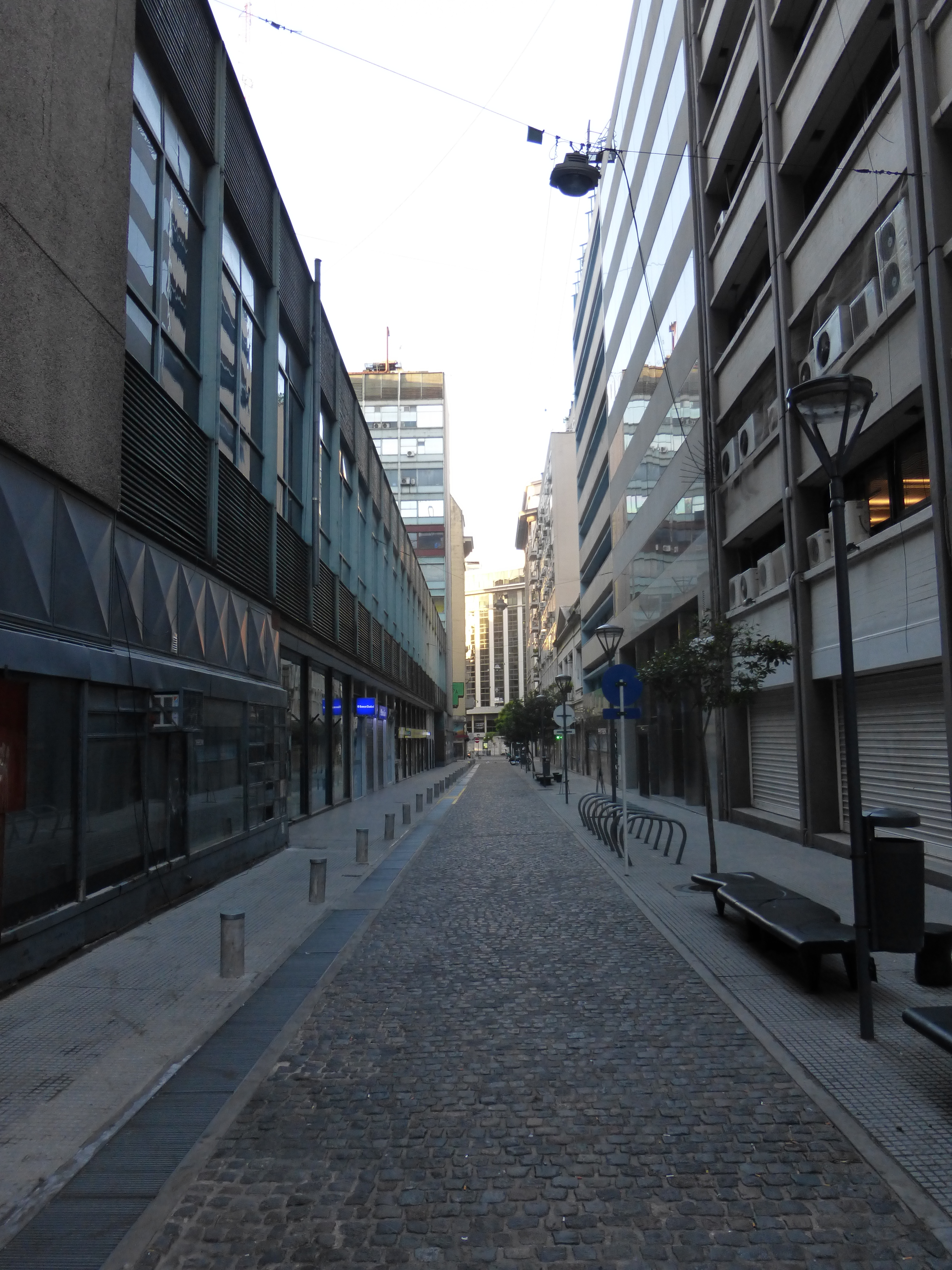 Vista del Pasaje Carabelas, en sentido norte, ubicado en el barrio porteño de San Nicolás.